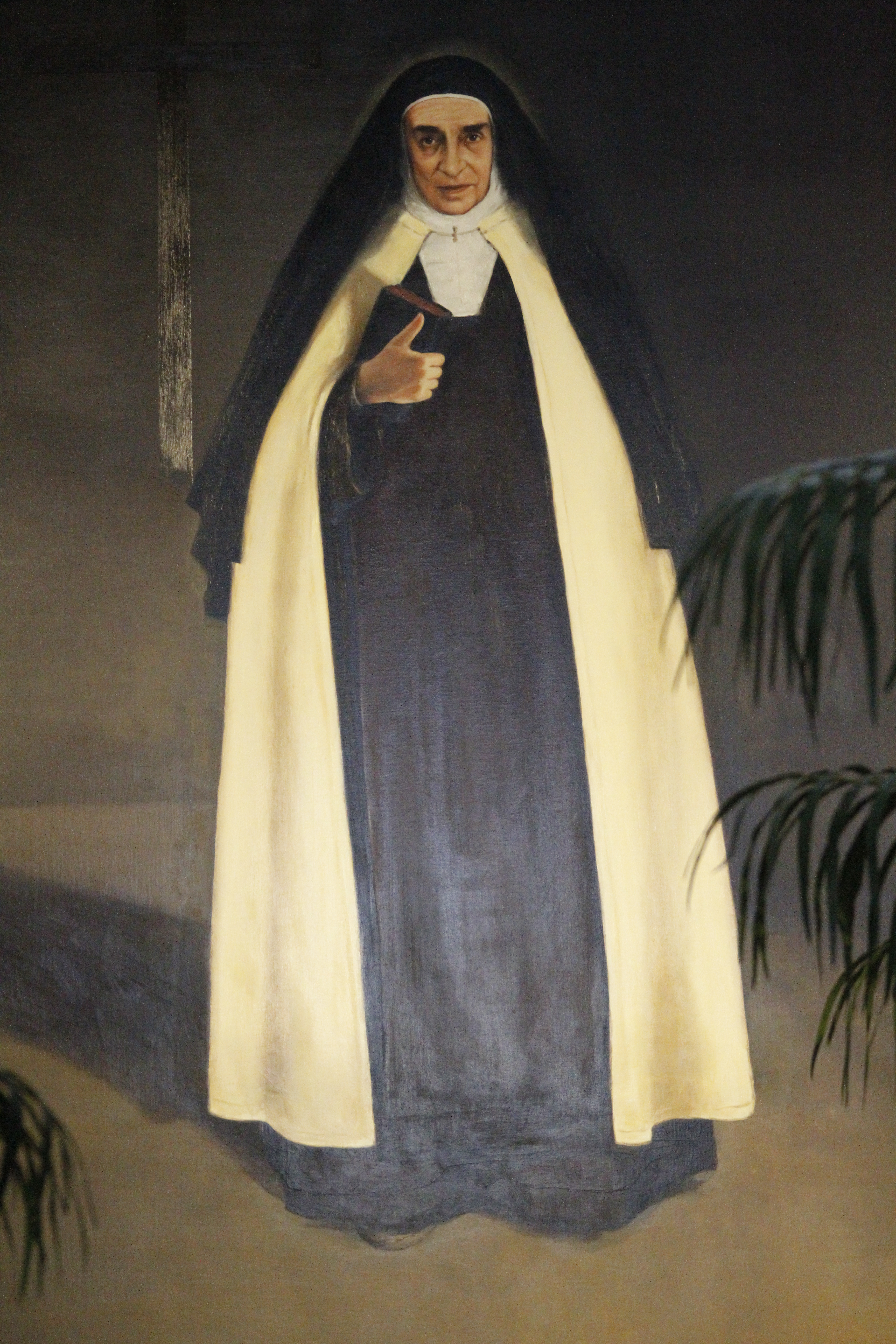 Interior da Catedral